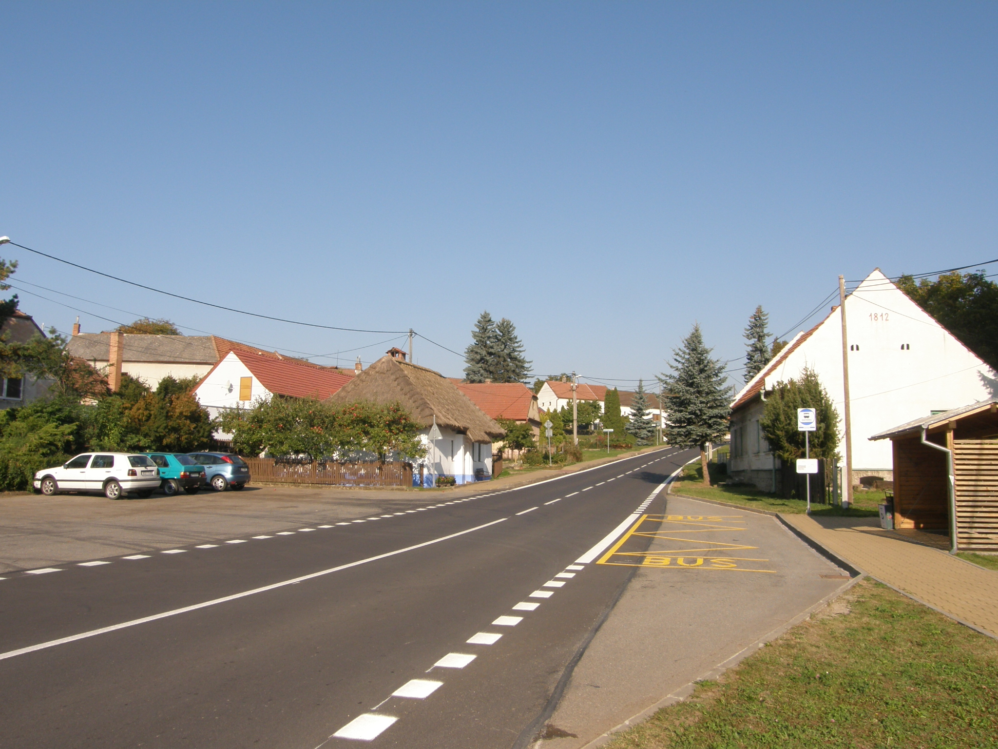 Ruprechtov